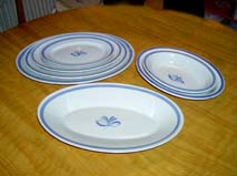 Tallrikar och uppläggningsfat. Modell och dekor: "Blått Band", Gefle porslinsfabrik. Formgivning: Arthur Percy, lanserades på Stockholmsutställningen 1930.